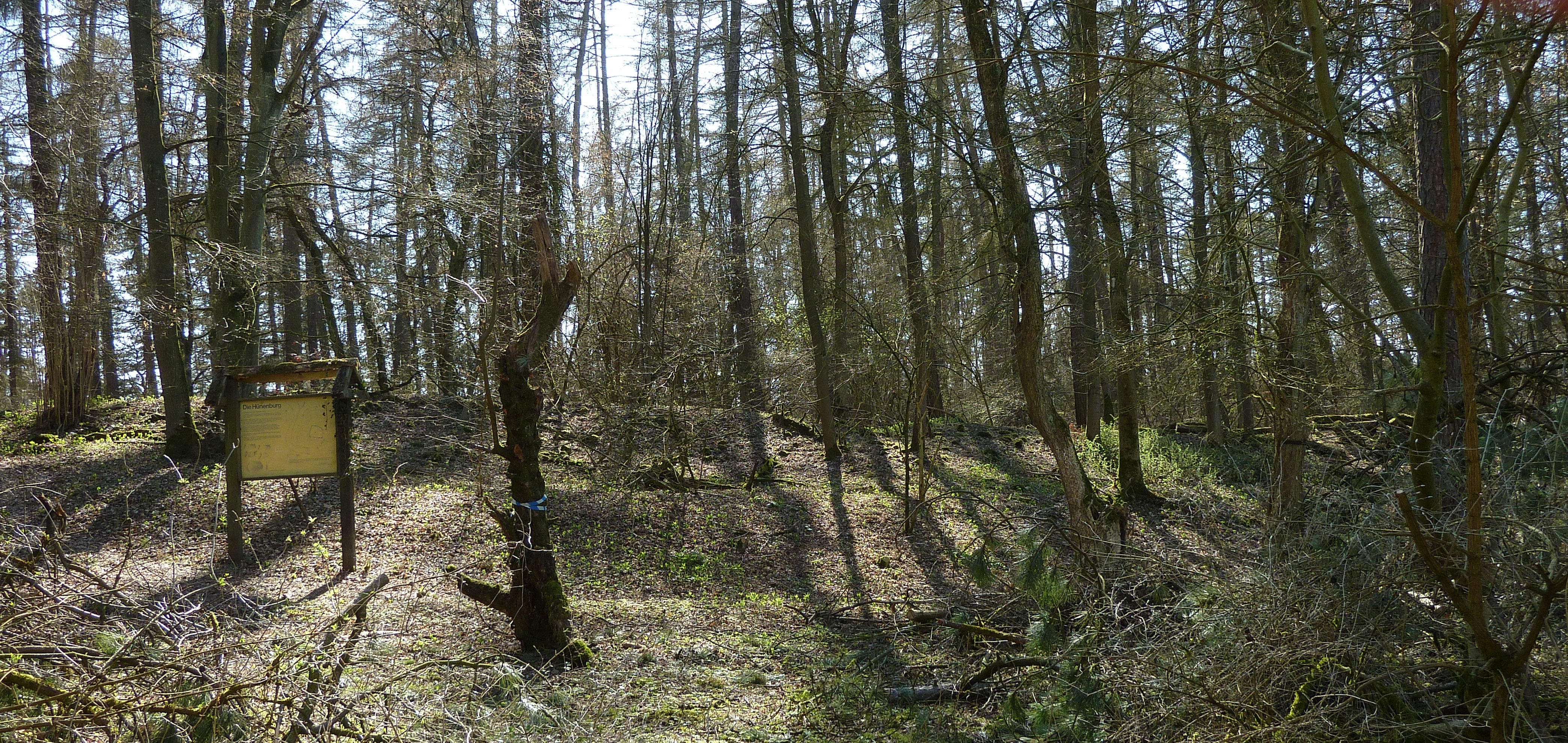 Blick auf den Nordwall der Hünenburg über dem Auschnippetal. Frühmittelalterliche Befestigungsanlage des 9.-11. Jahrhunderts auf einem Bergsporn des Ossenbergs über dem Auschnippetal mit verstürzter Steinmauer und am Steilhang auslaufendem Graben, Seitenlänge der Anlage ca. 120 m. Die Hünenburg liegt im Naturschutzgebiet „Ossenberg-Fehrenbusch“.